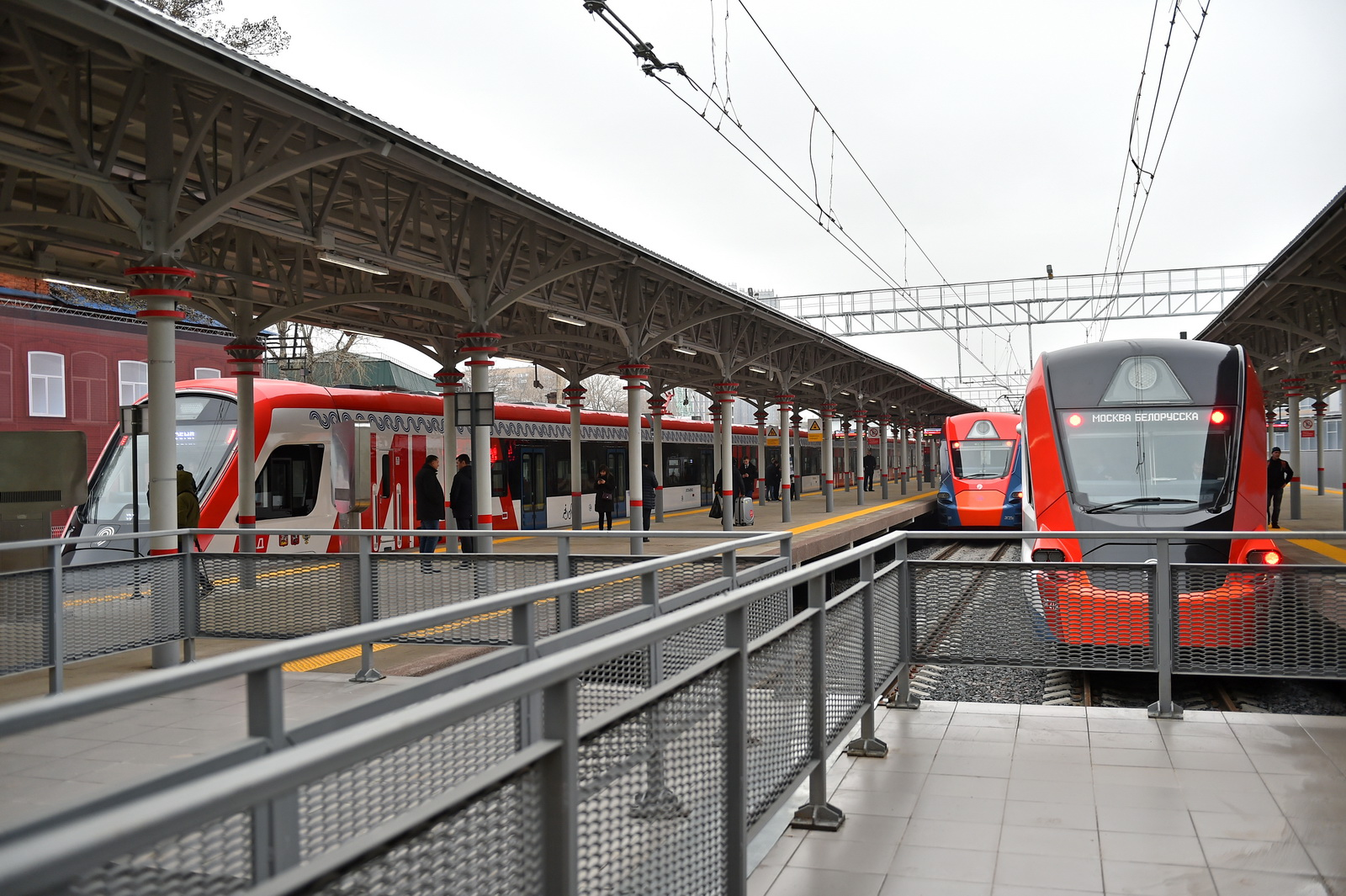 Электропоезда ЭГ2Тв-029, 001 и 0?? на Белорусском вокзале в Москве